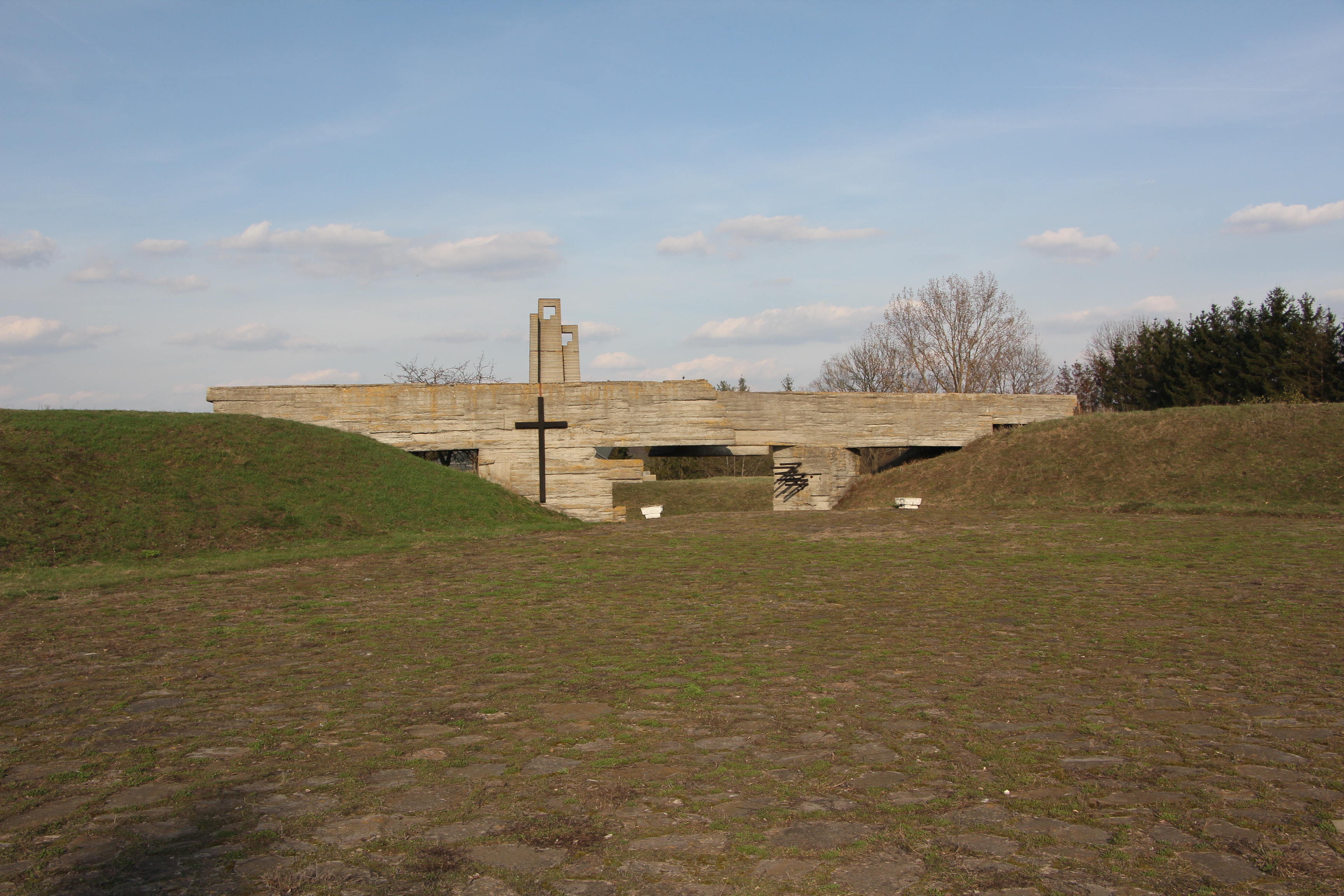 Меморіальний комплекс загиблим односельчанам в селі Молотків Лановецького району, Тернопільської області